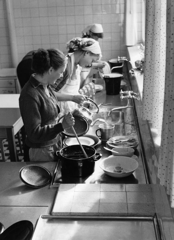 Neue Münsterschule in Bonn In einer sehr modernen Küche lernen die Mädchen der 8. Klasse das Kochen. Drei Stunden Kochunterricht stehen wöchentlich auf dem Stundenplan. Die Mädchen waschen das Geschirr ab.